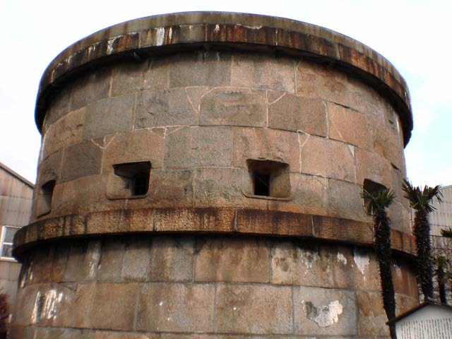 Wadamisaki Houdai(shore battery ,Kobe,Japan)